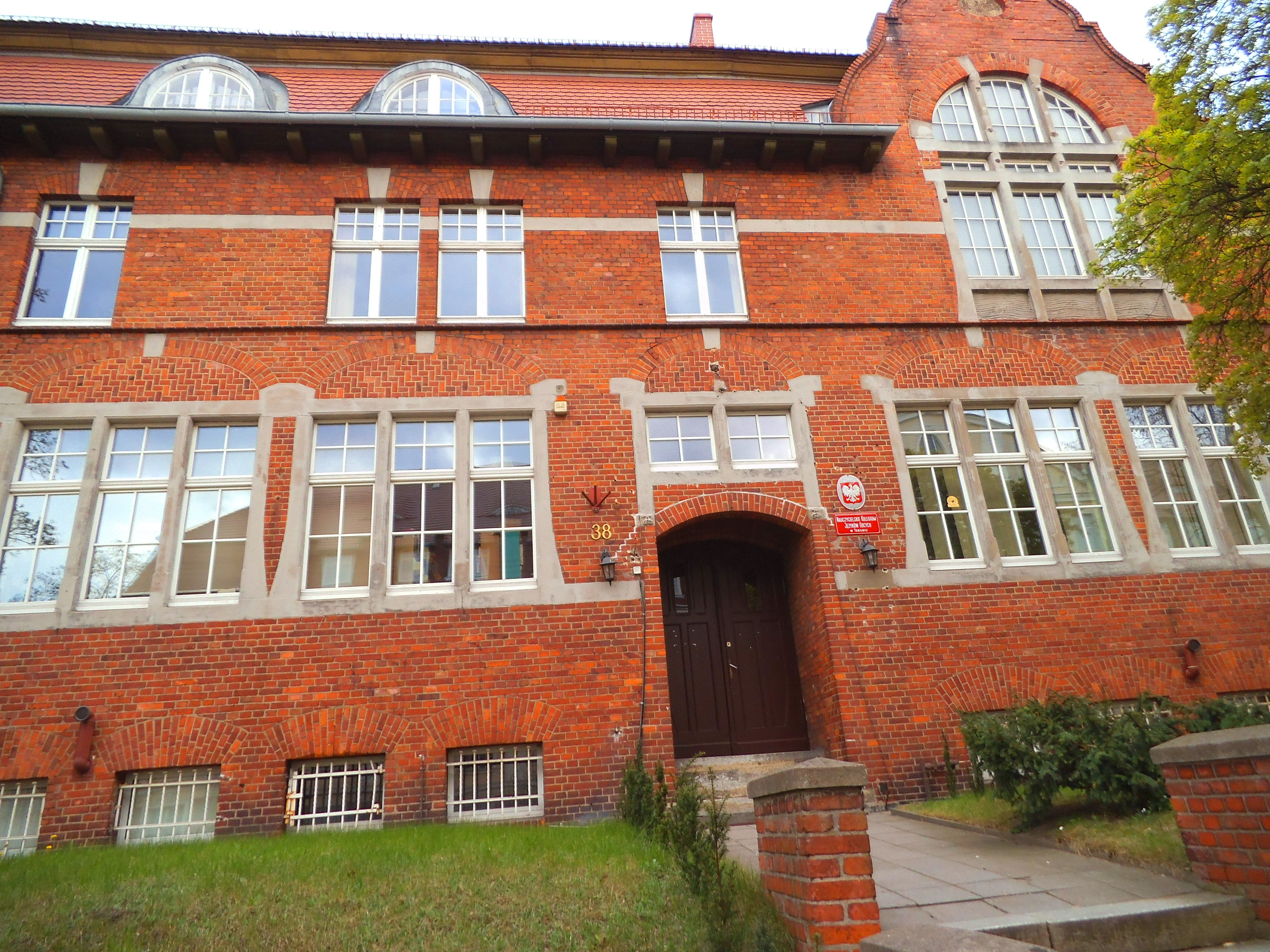 Budynek (fasada) przy ul. Sienkiewicza 38 w Toruniu